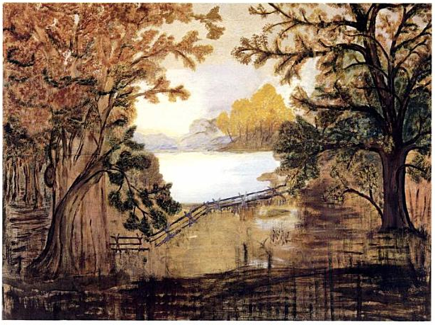 Fireboard